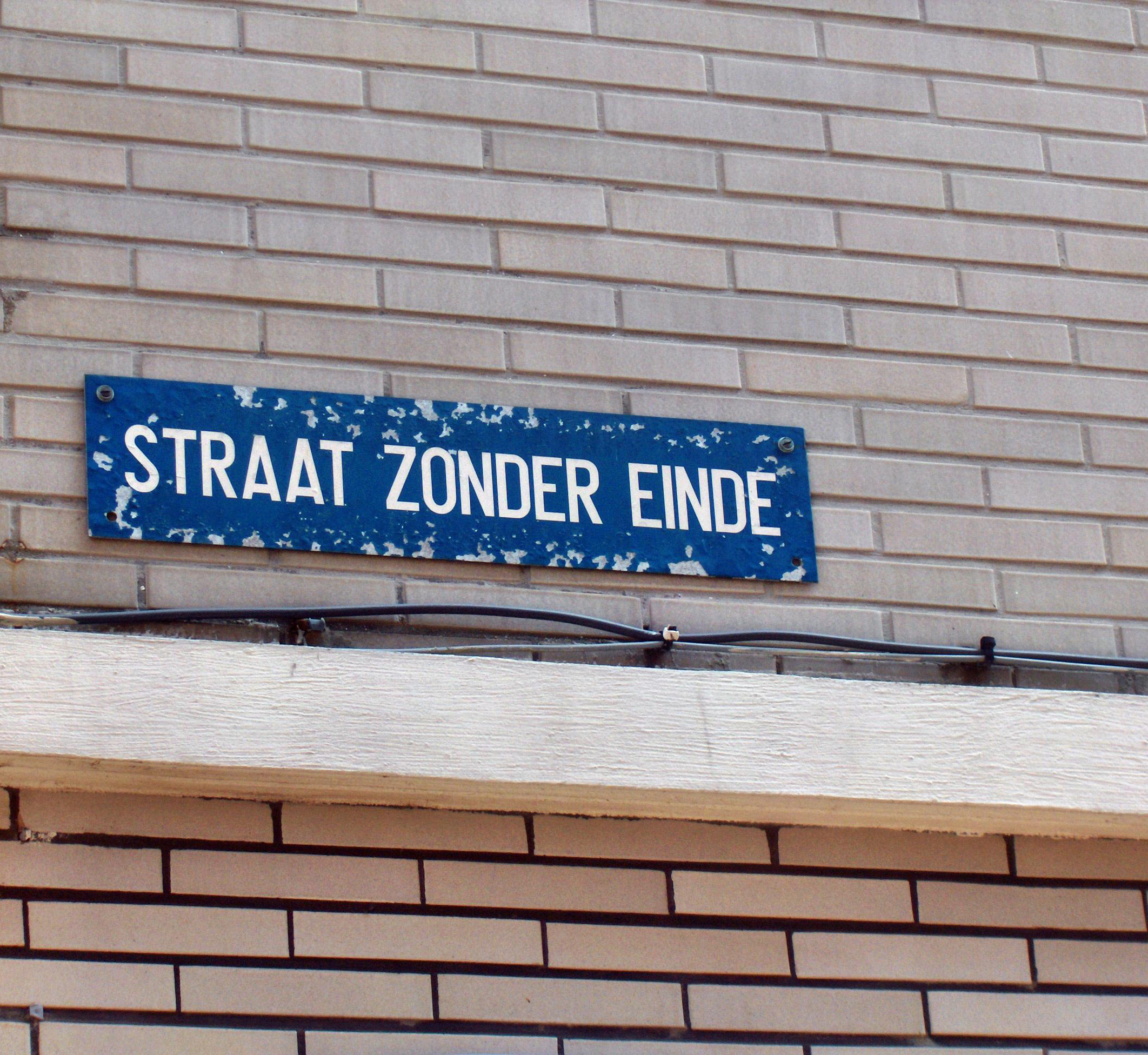 Straat zonder einde ; straatnaam in Oostende, België